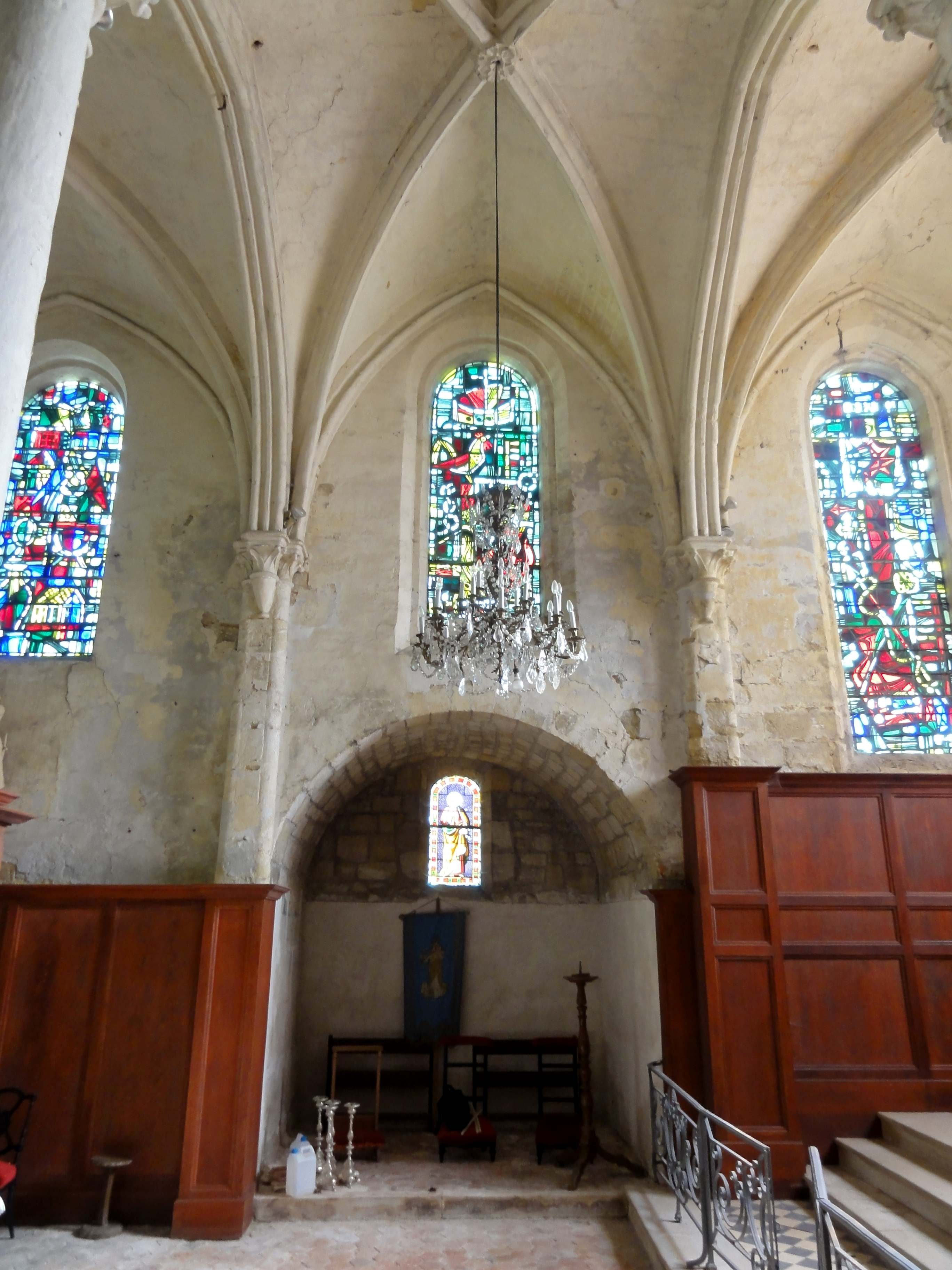 Intérieur de l'église - voir titre.